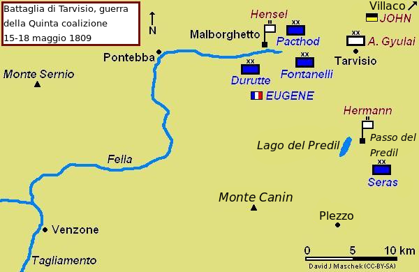 Mappa della Battaglia di Tarvisio (1809)